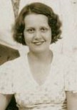 Teresa "Teté" Casuso Morín